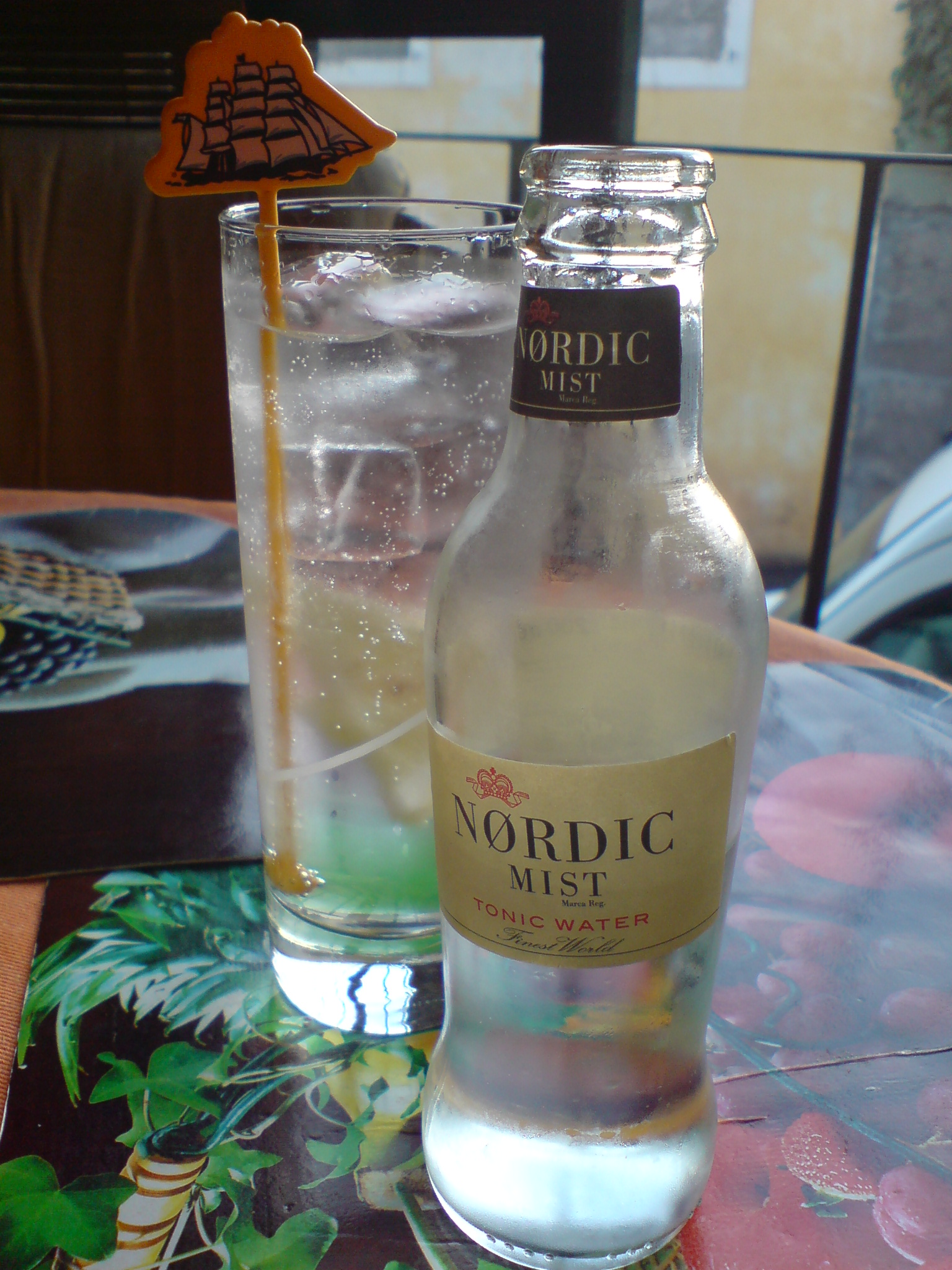 Tonik.